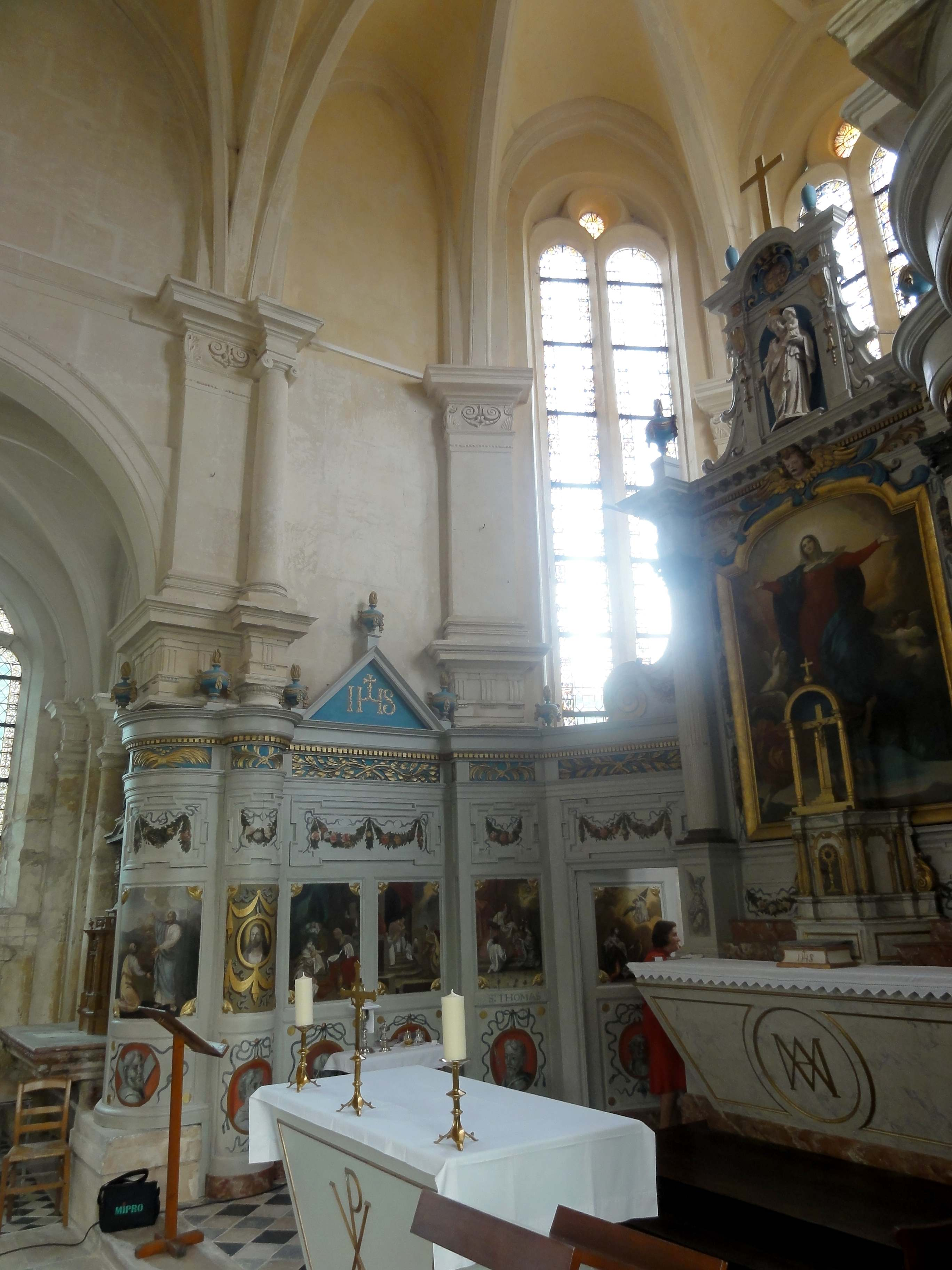 Abside.